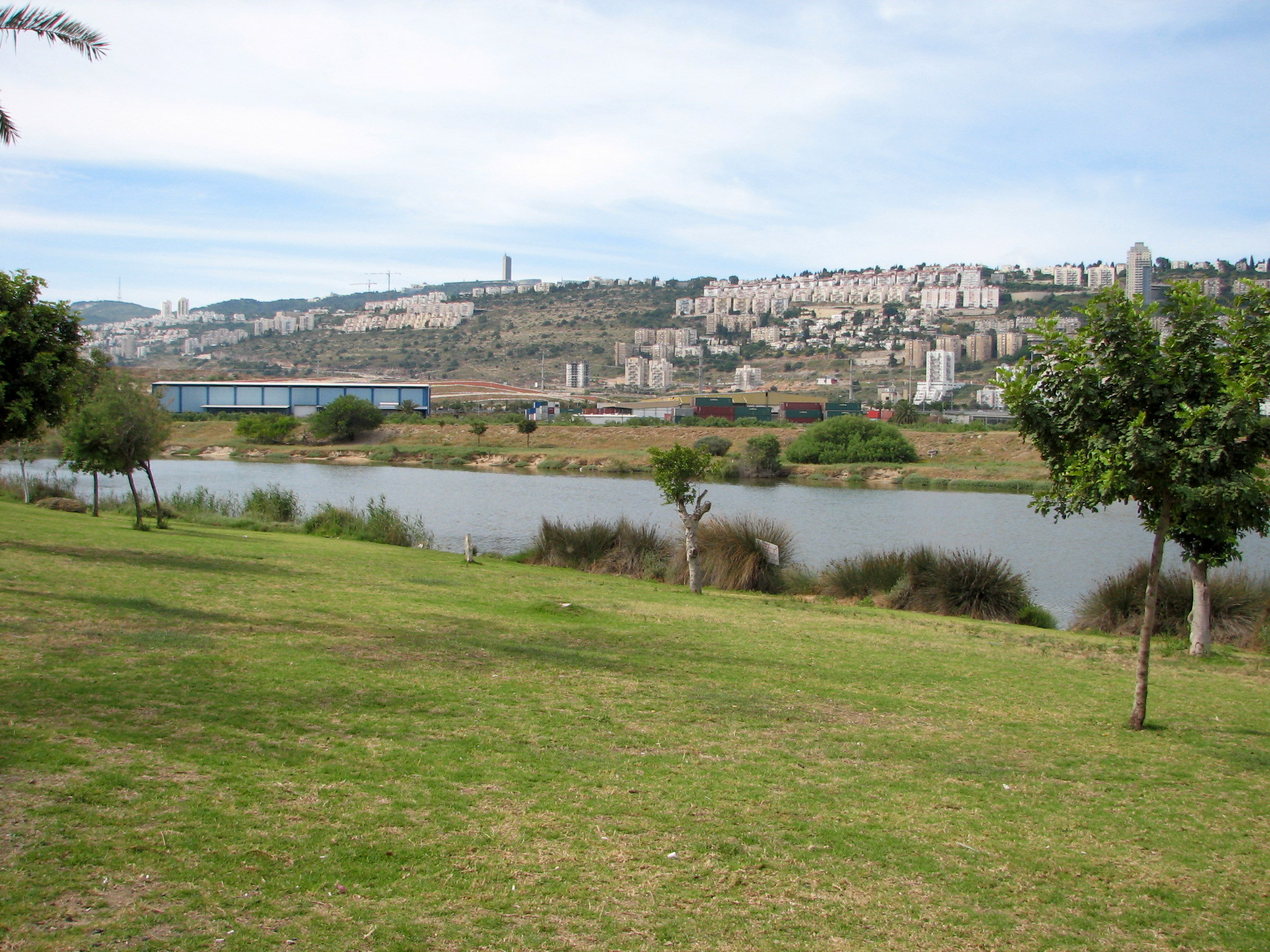 Nesher The Kishon River is a river in Israel that flows into the Mediterranean Sea at the city of Haifa.His length is 70 km. נחל קישון זורם מג'נין שבשומרון, לאורך כ-70 ק"מ, דרך עמק יזרעאל, מפער הקישון (המעבר הצר בין הכרמל לגבעות אלונים שפרעם) ועמק זבולון, עד יציאתו לים במפרץ חיפה. בשפך הנחל נמצא נמל הקישון. שטח אגן הניקוז שלו הוא השני בגודלו מבין נחלי החוף, כ-1,110 קמ"ר ולאורך חלק ניכר מאפיקו זרימתו איתנה. הנחל סבל מזיהום רב במיוחד באפיקו התחתון. בתחילת שנות ה2000 עבר הנחל שיקום באמצעות רשות נחל קישון והדגה והעופות חזרו לנחל פארק הקישון בחיפה, מבט לכוון דרום מזרח מצד שמאל בתי נשר מימין שכונת נווה שאנן בחיפה